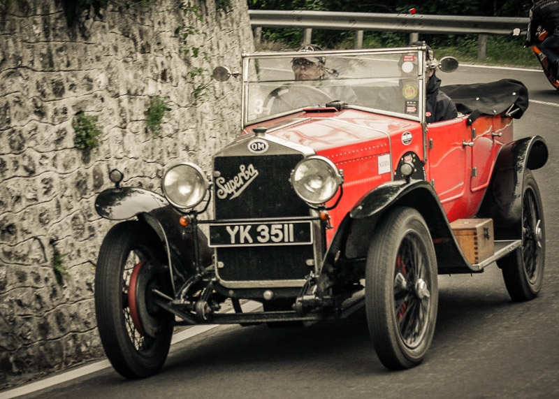 1000 miglia 2012 - SS della Futa . Pianoro (BO)